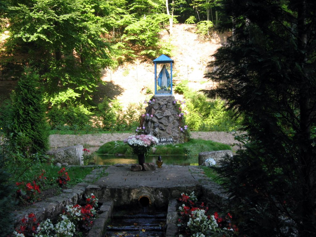 Springhead of Kacza river in Gdynia Wielki Kack. Rafal Konkolewski 2005 Źródło Marii, Gdynia Wielki Kack